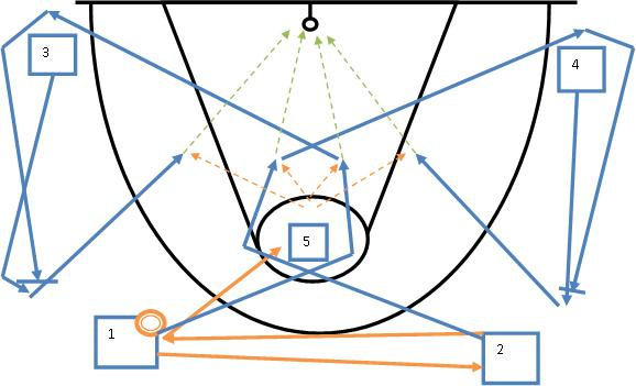 Zagrywka koszykarska (teoria)